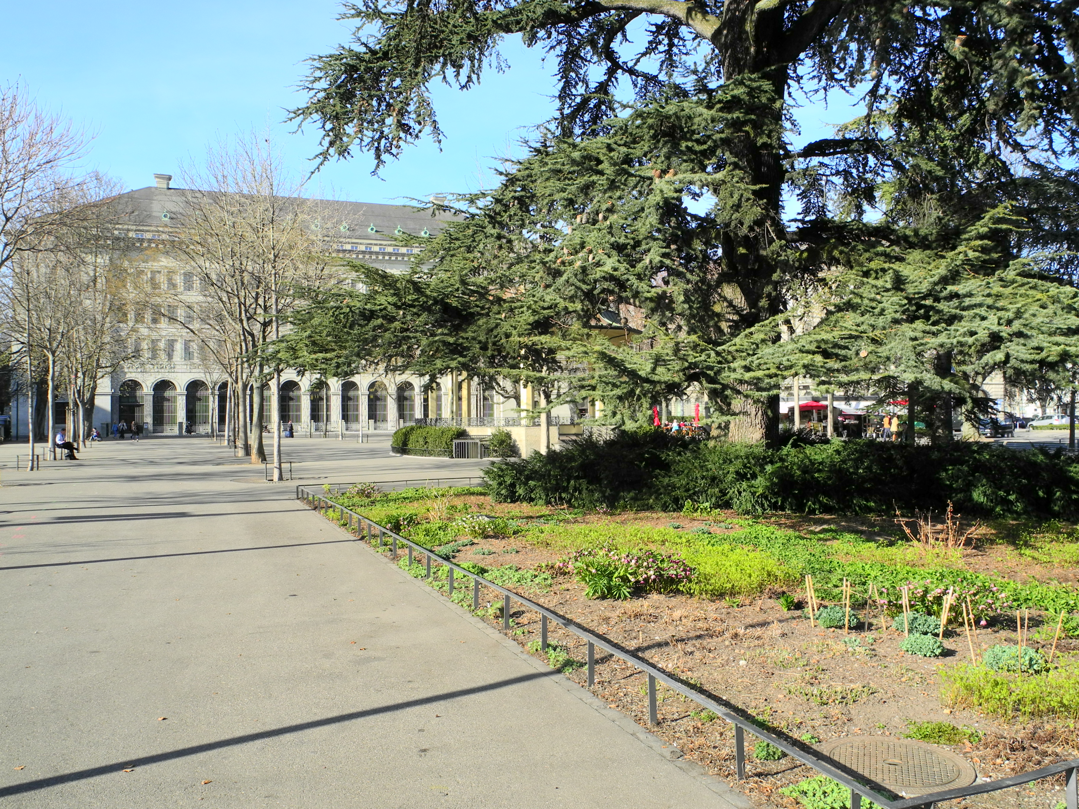 Bürkliplatz in Zürich (Switzerland), Schweizerische Nationalbank in the background.